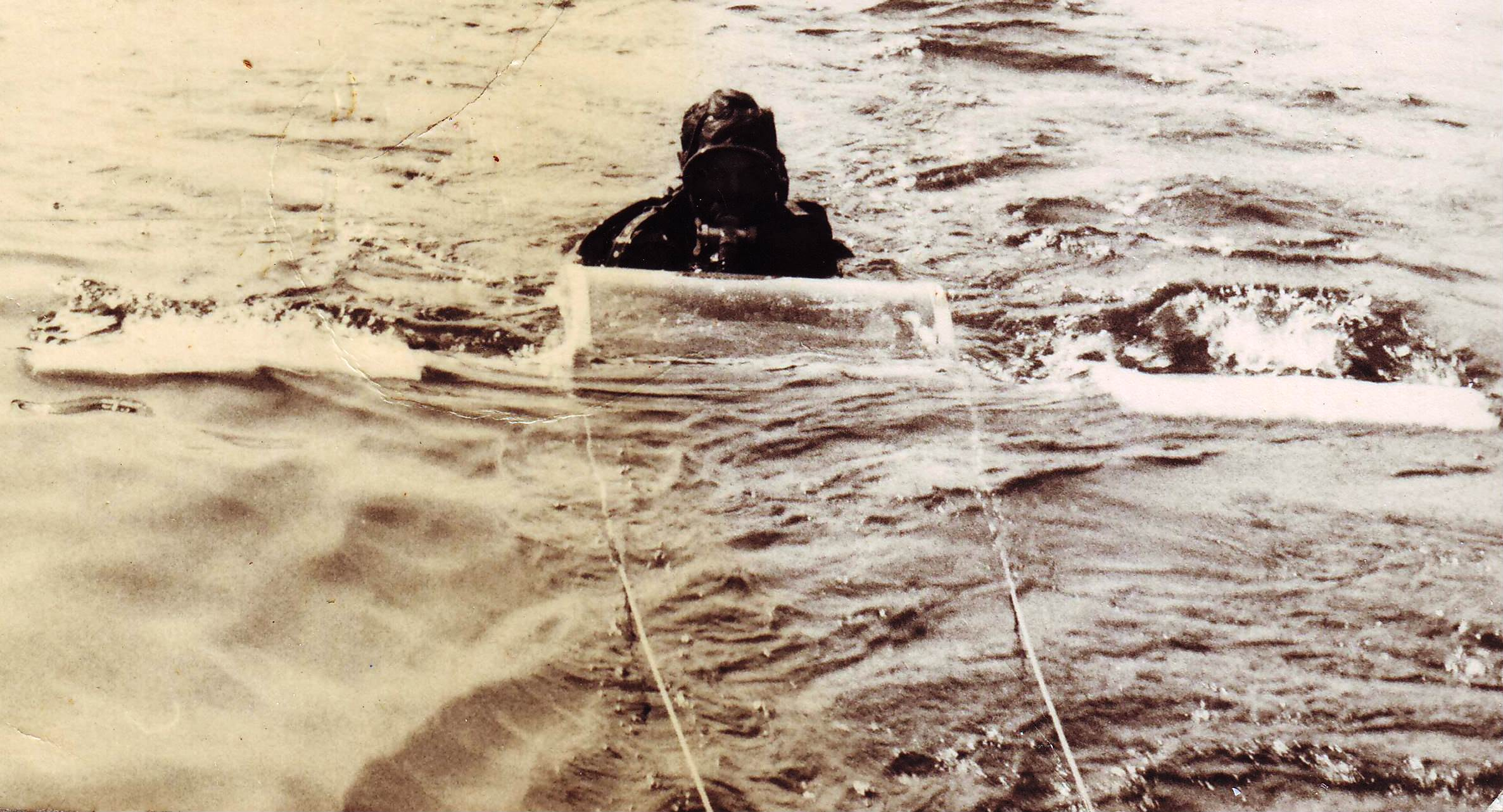 צולל בסריקה עם עריסת תצפית איטלקית